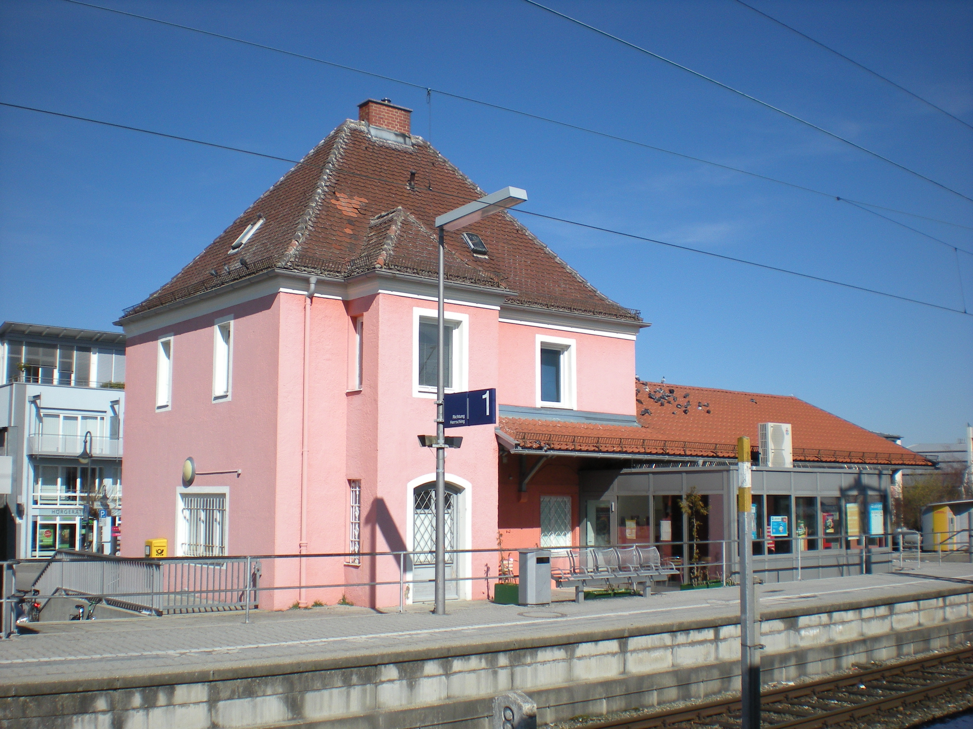 Empfangsgebäude des Münchner S-Bahnhofs Germering-Unterpfaffenhofen von der Gleisseite